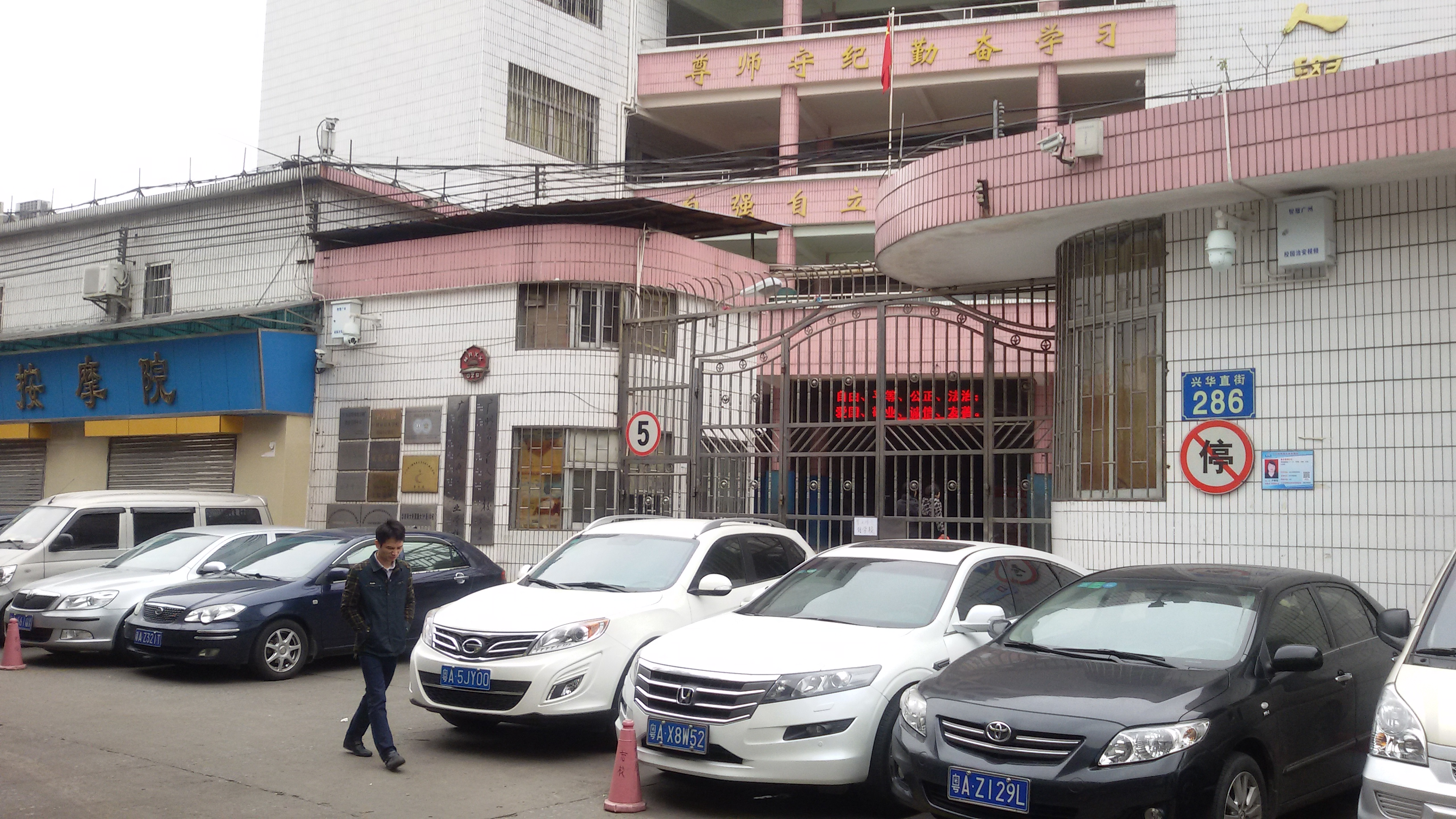 粵語: 廣州市盲人學校